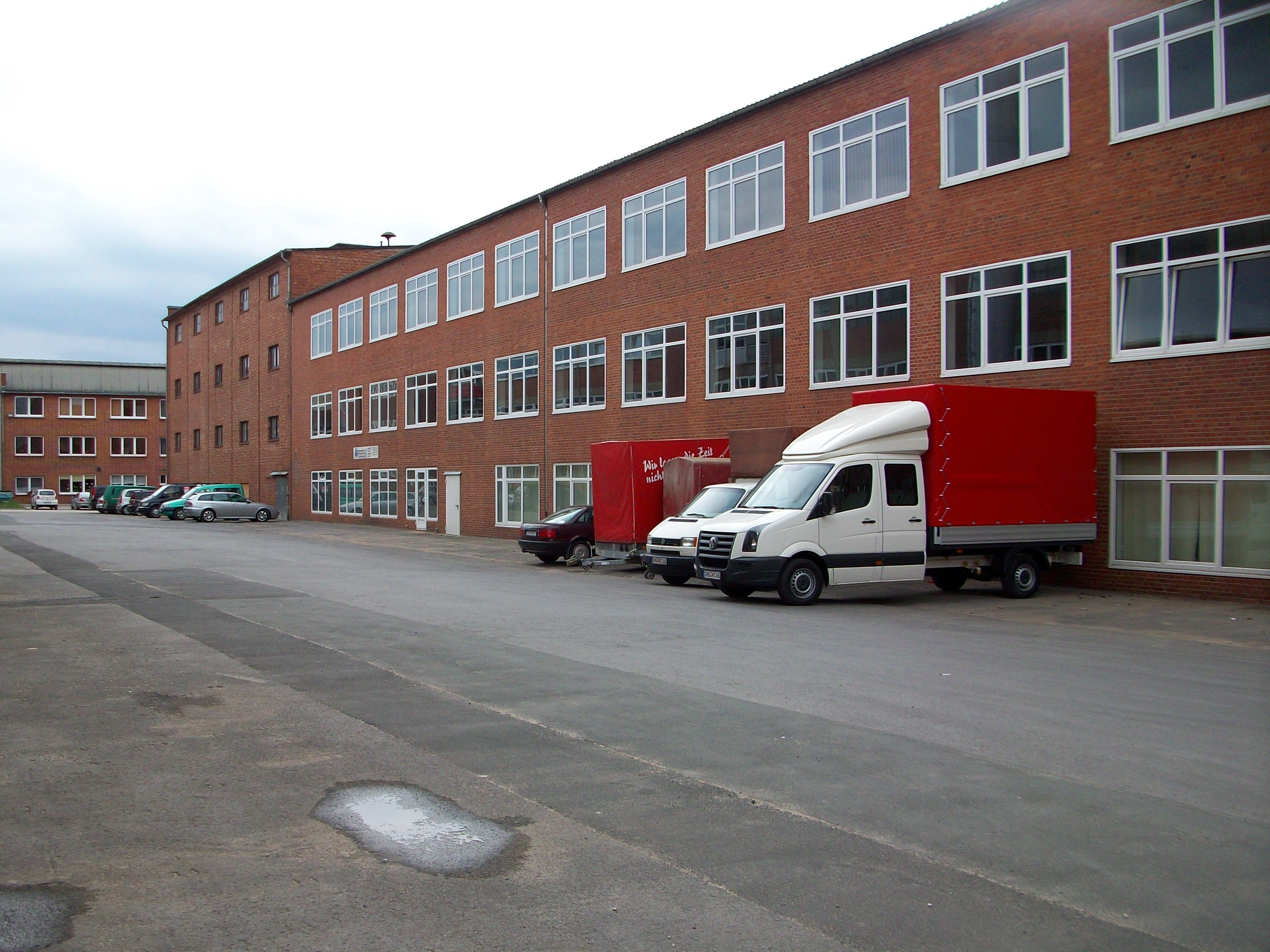 Innenhof und Gebäude II im Gewerbepark